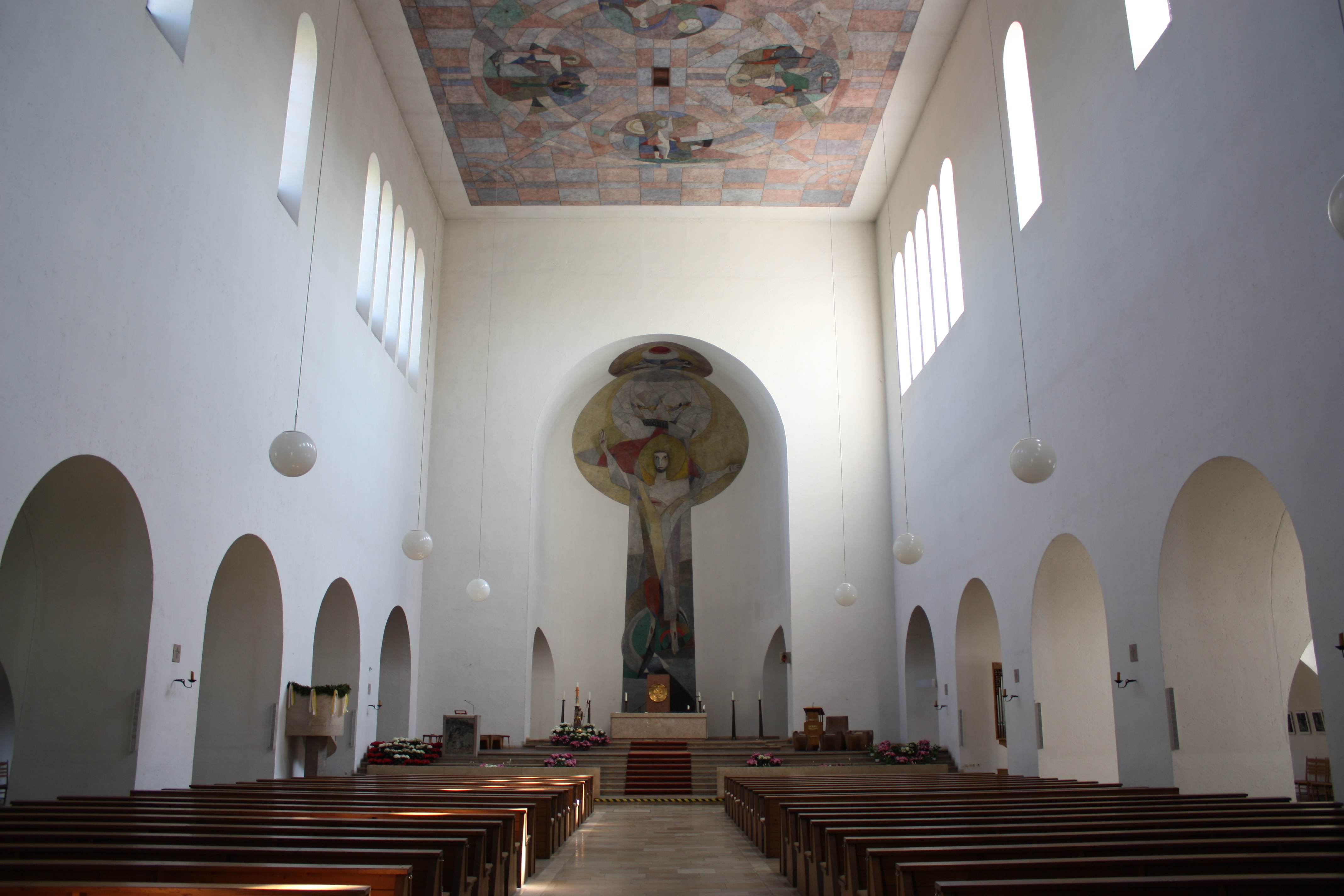 St. Maximilian in Augsburg